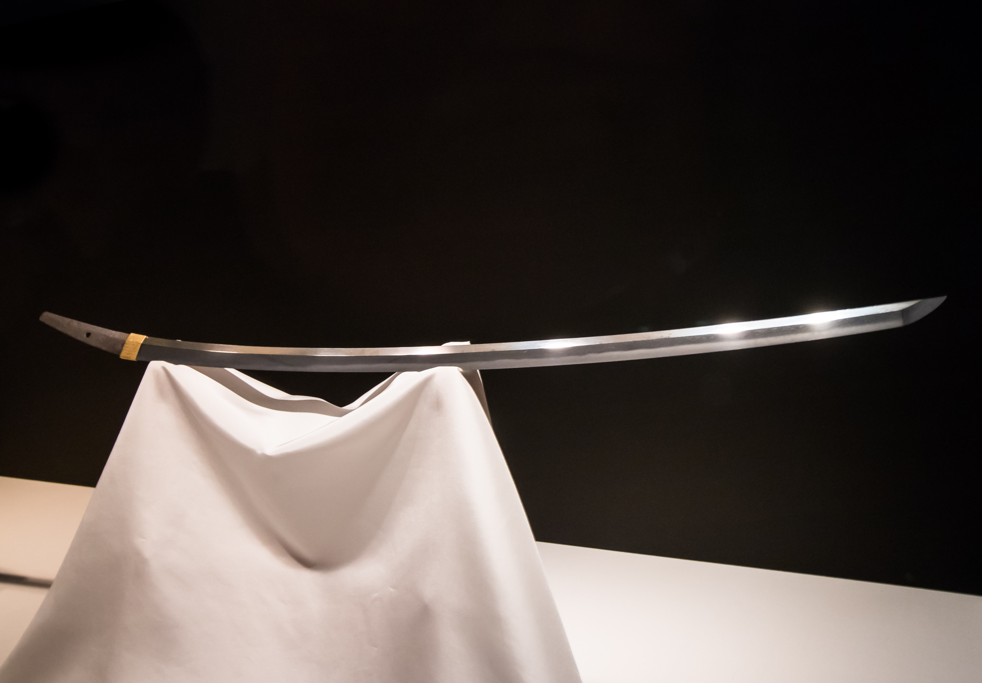 太刀。伯耆安綱（名物 童子切安綱）、銘「安綱」（国宝）。平安時代10～12世紀。